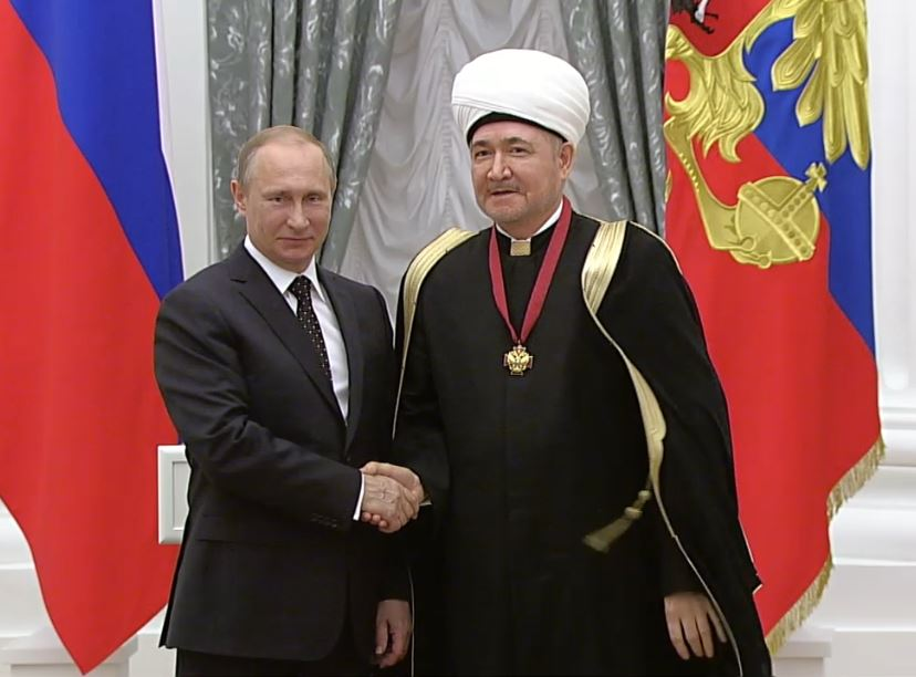 Председатель Совета муфтиев России Равиль Гайнутдинов и Владимир Путин на церемонии вручения Государственных наград и званий в Кремле 21 мая 2015 года.